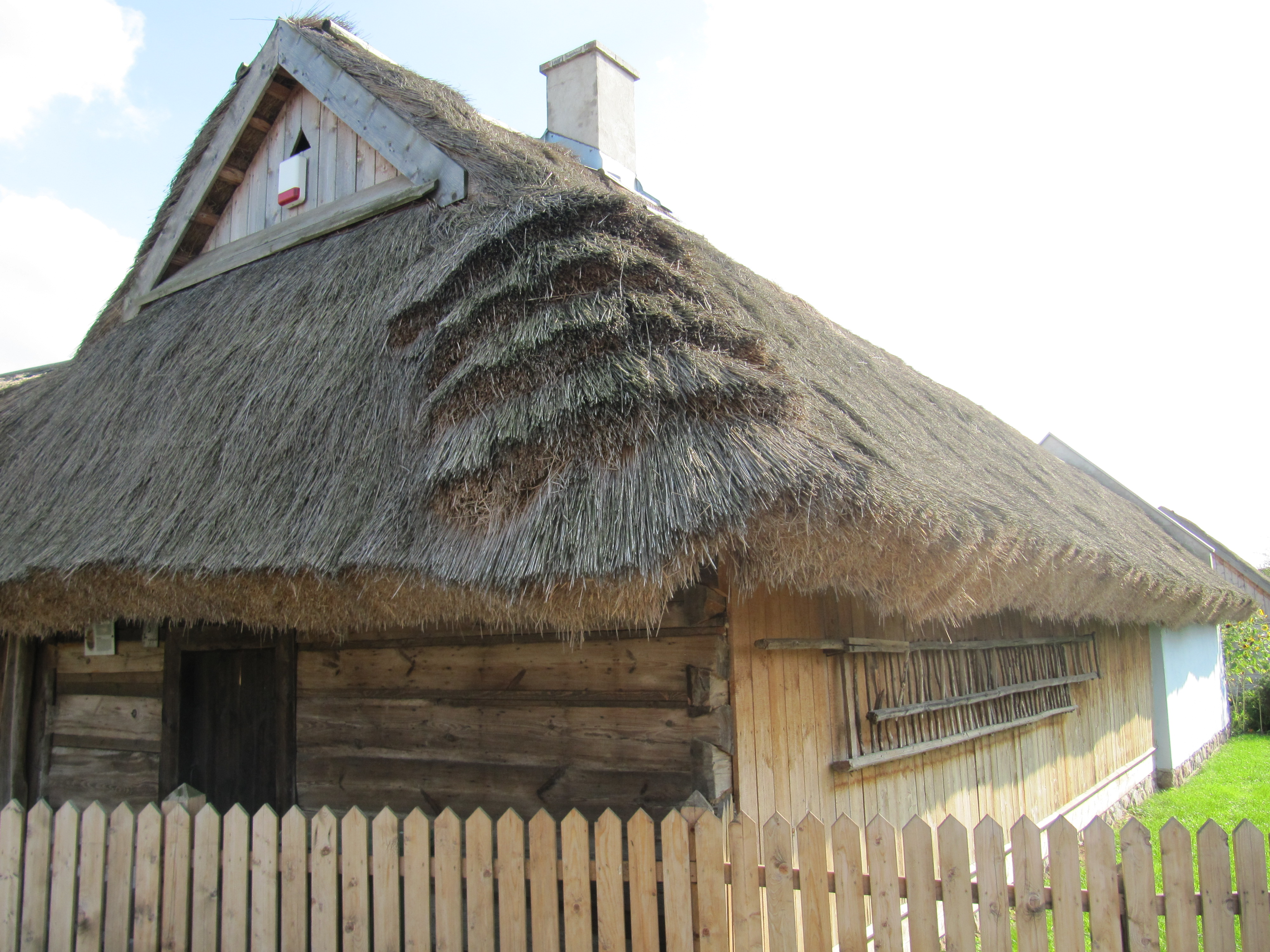 Radomsko, ul. Częstochowska 5 - dom, tzw. chata tatarska, mur., kon. XVIII w. (zabytek nr 21/603-X-54)